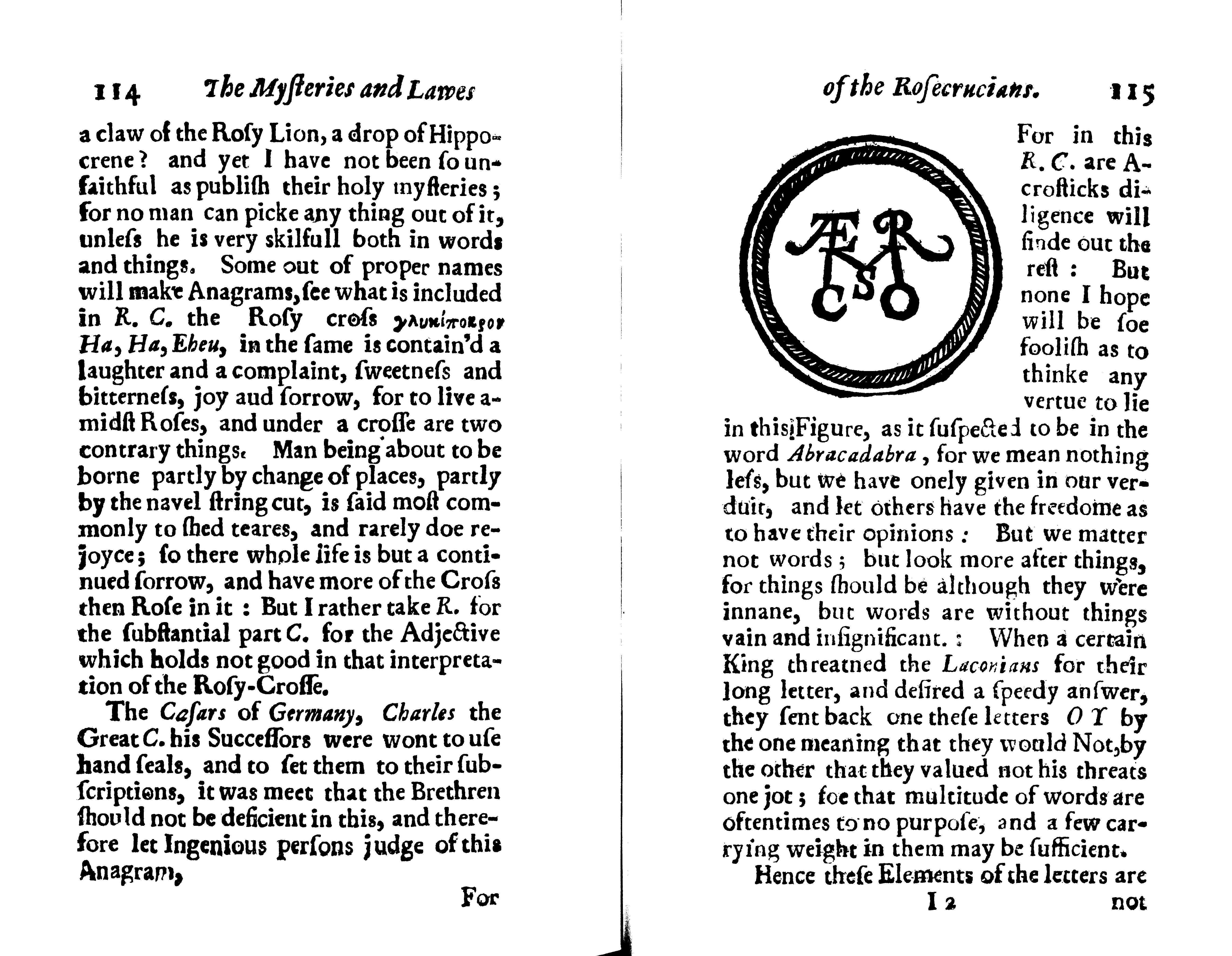 Zwei Seiten aus Michael Maiers "Themis Aurea. The Laws of the Fraternity of the Rosie Crosse. London 1656, S. 114–115, mit einem angeblichen Siegel des Ordens.